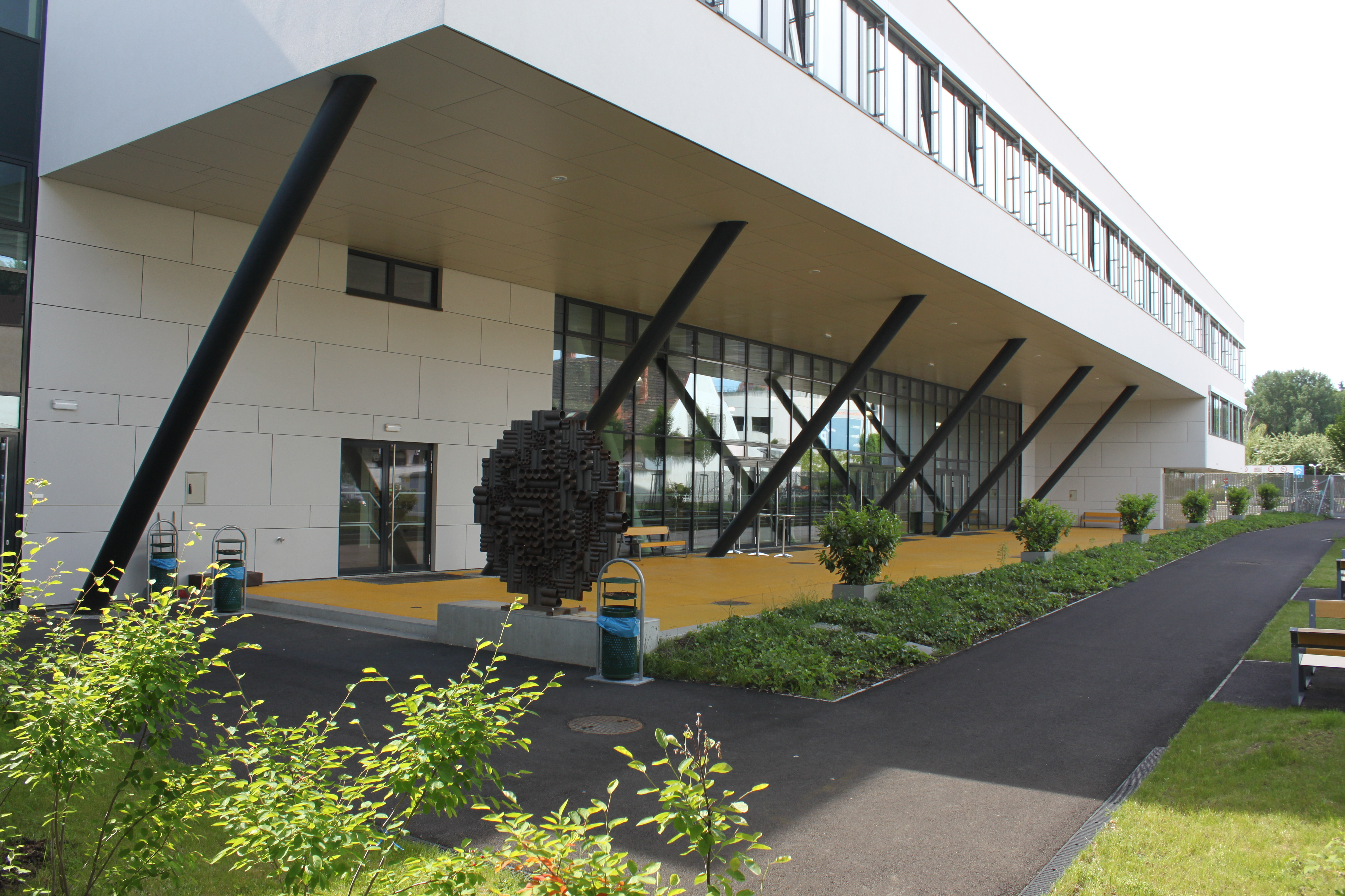 Handelsakademie und Handelsschule Wiener Neustadt vom aus gesehen